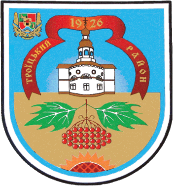 Герб Троїцького району